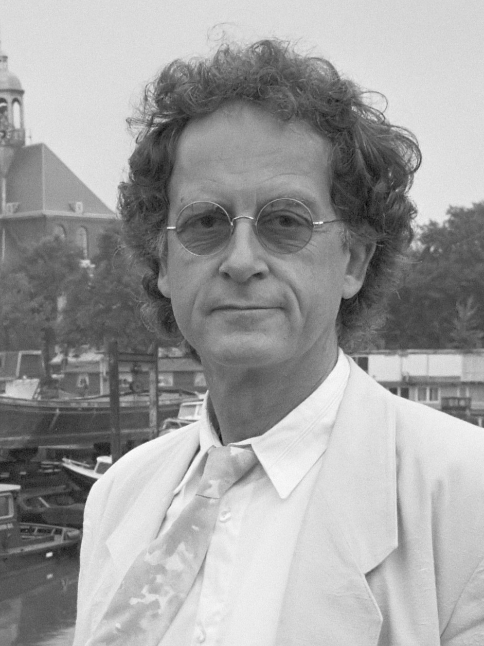 Musicus en componist Loek Dikker 27 juni 1989